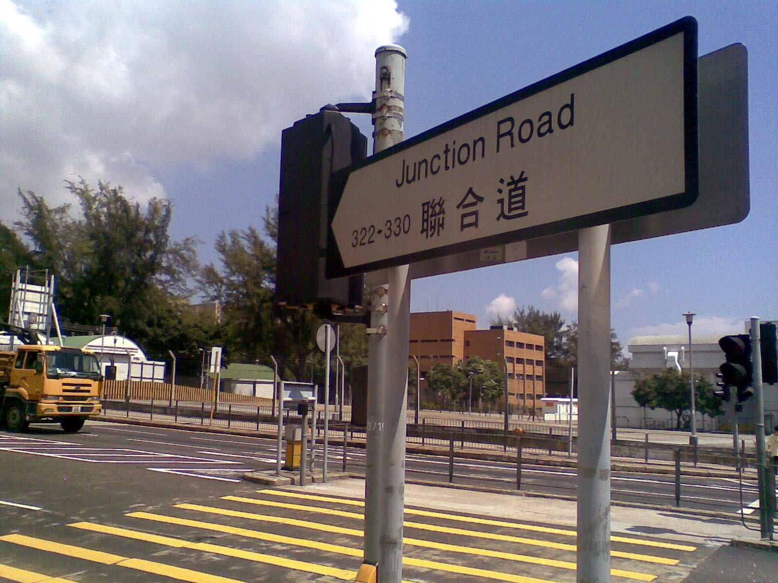 聯合道近窩打老道